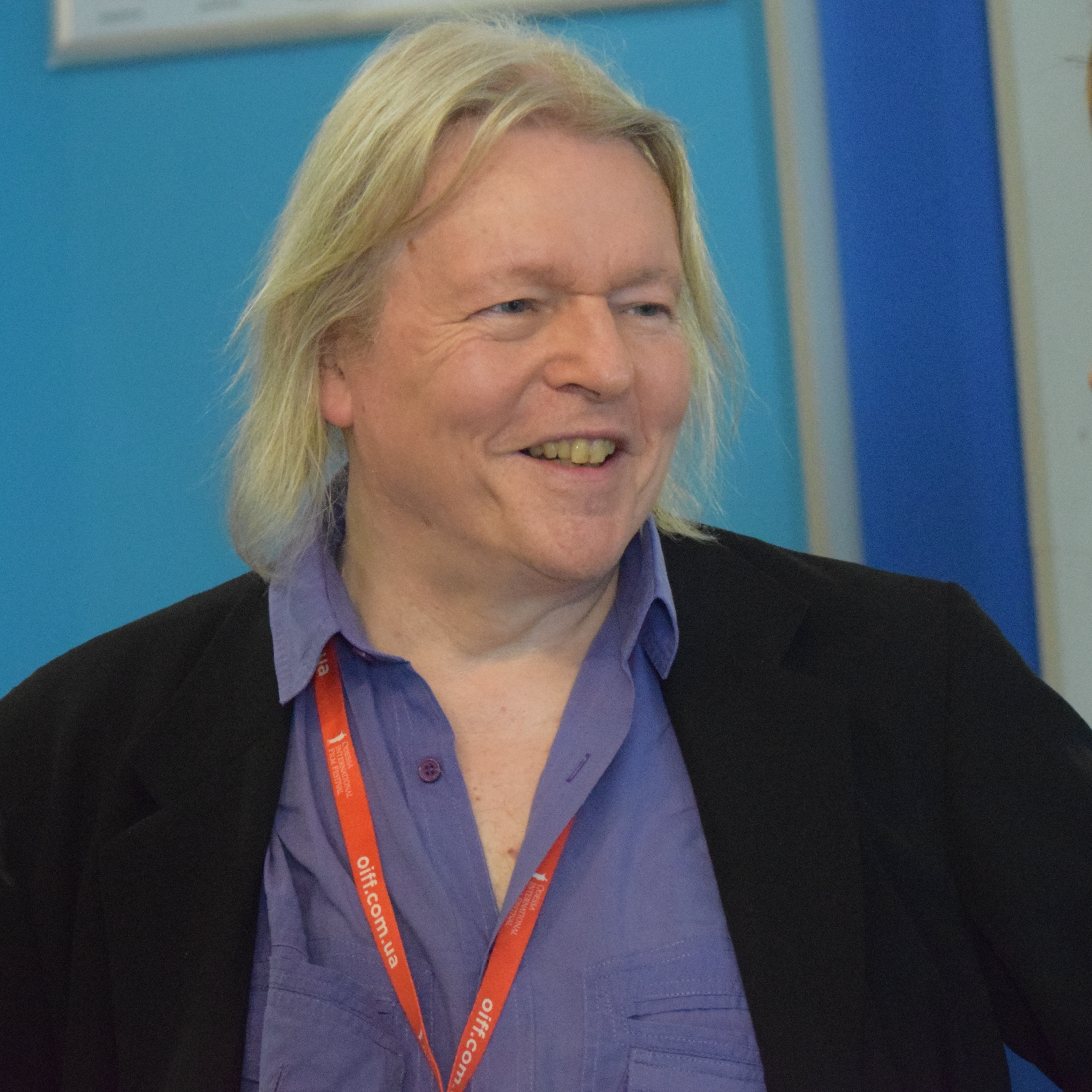 Кристофер Хэмптон на 7-м Одесском международном кинофестивале.